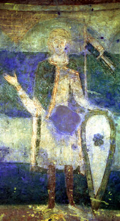 Фрэска з выявай Само, караля славянаў, у Зноемскай ратондзе ў Маравіі (здымак у ультрафіялетавым святле зроблены F. Sysel і K. Dvořáková, 1999)